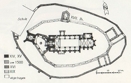 Planul fortificatiei din Seica Mica.